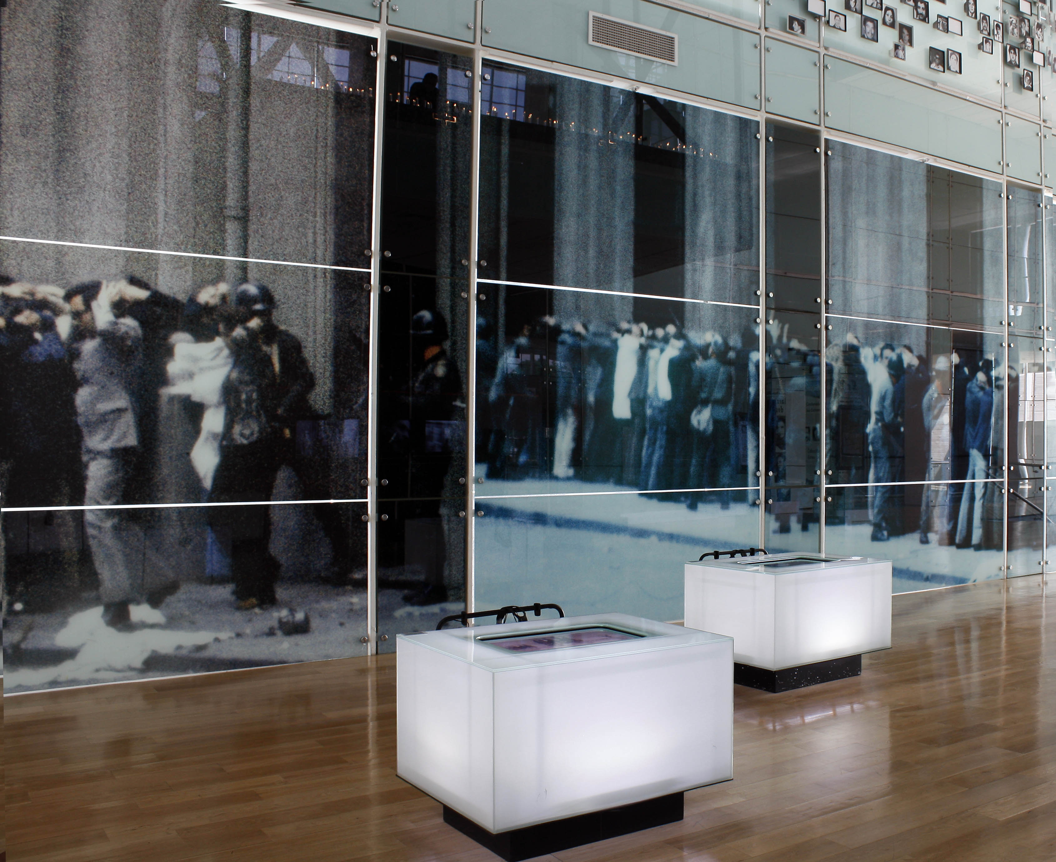 Fotografía de la sala 11 de septiembre del Museo de la Memoria de Santiago de Chile que muestra los primeros momentos del Régimen militar chileno entre 1973 y 1989